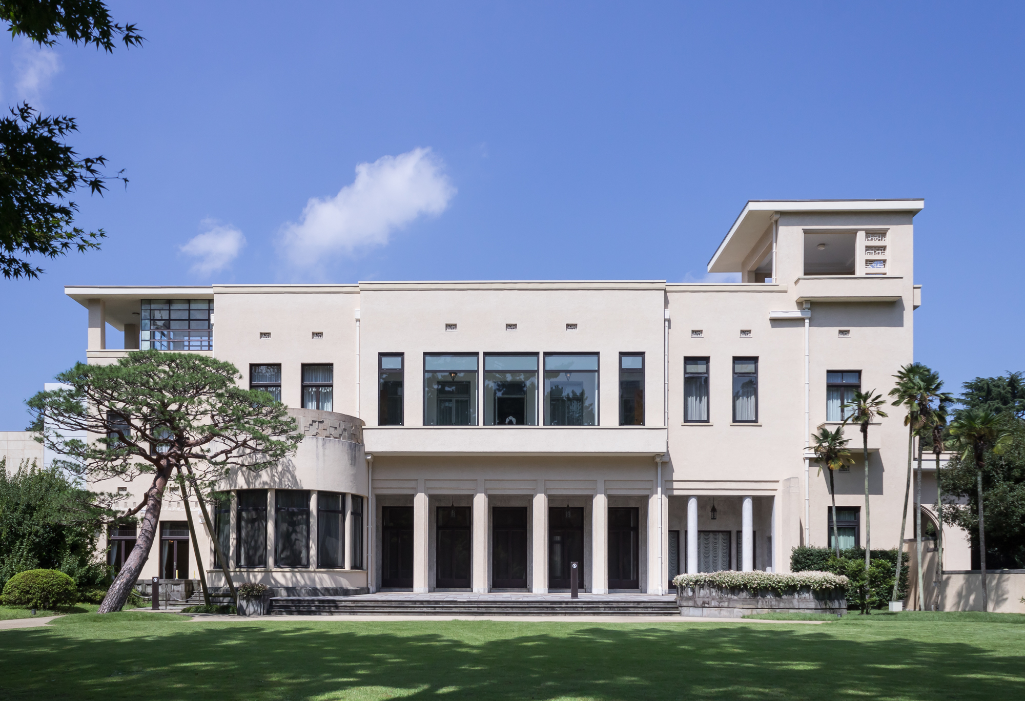 東京都庭園美術館(旧朝香宮鳩彦王邸宅)、重要文化財。東京都港区。